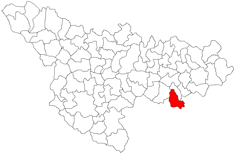 Categorie:Hărţi ale judeţului Timiş